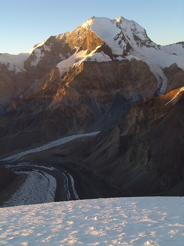 Пик Корженевской на закате. Вид из лагеря на плече Бородкина, ниже Памирского Фирнового Плато.